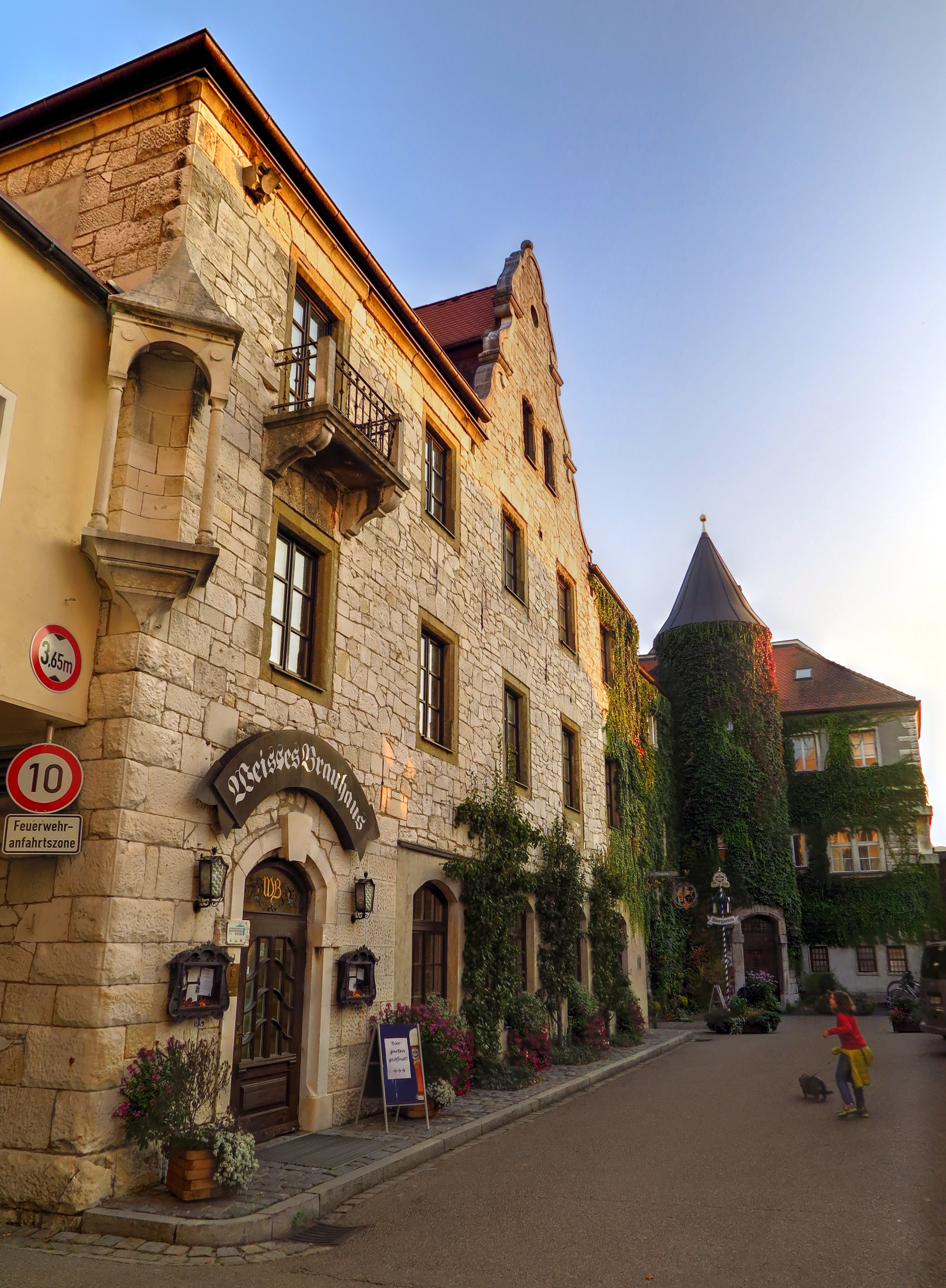 Deutschland, Bayern, Niederbayern, Landkreis und Stadt Kelheim, Weisses Brauhaus